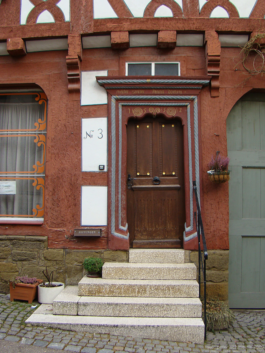 Portal von 1552 in Eppingen, St. Petersgasse 3